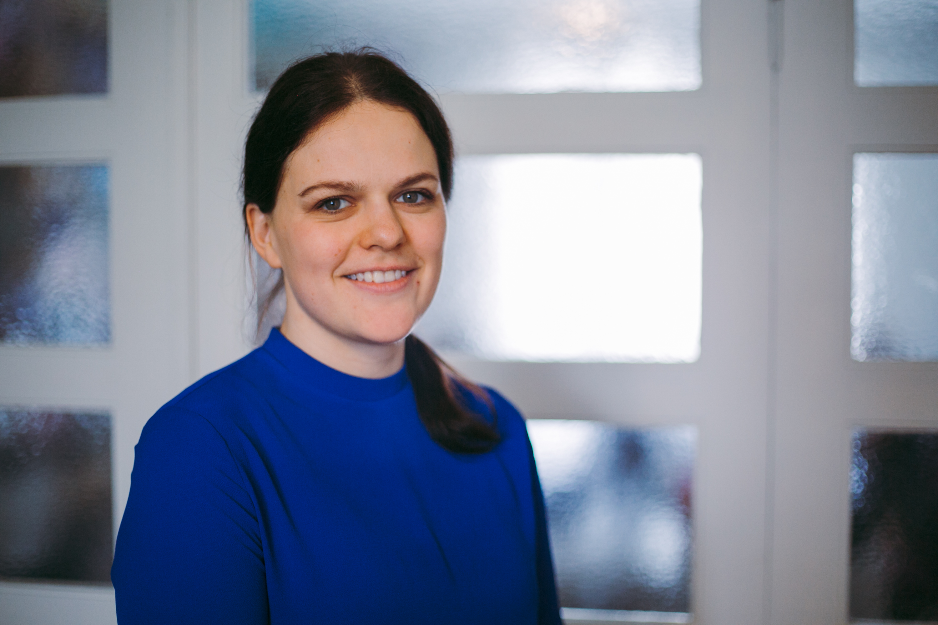 Merli Antsmaa